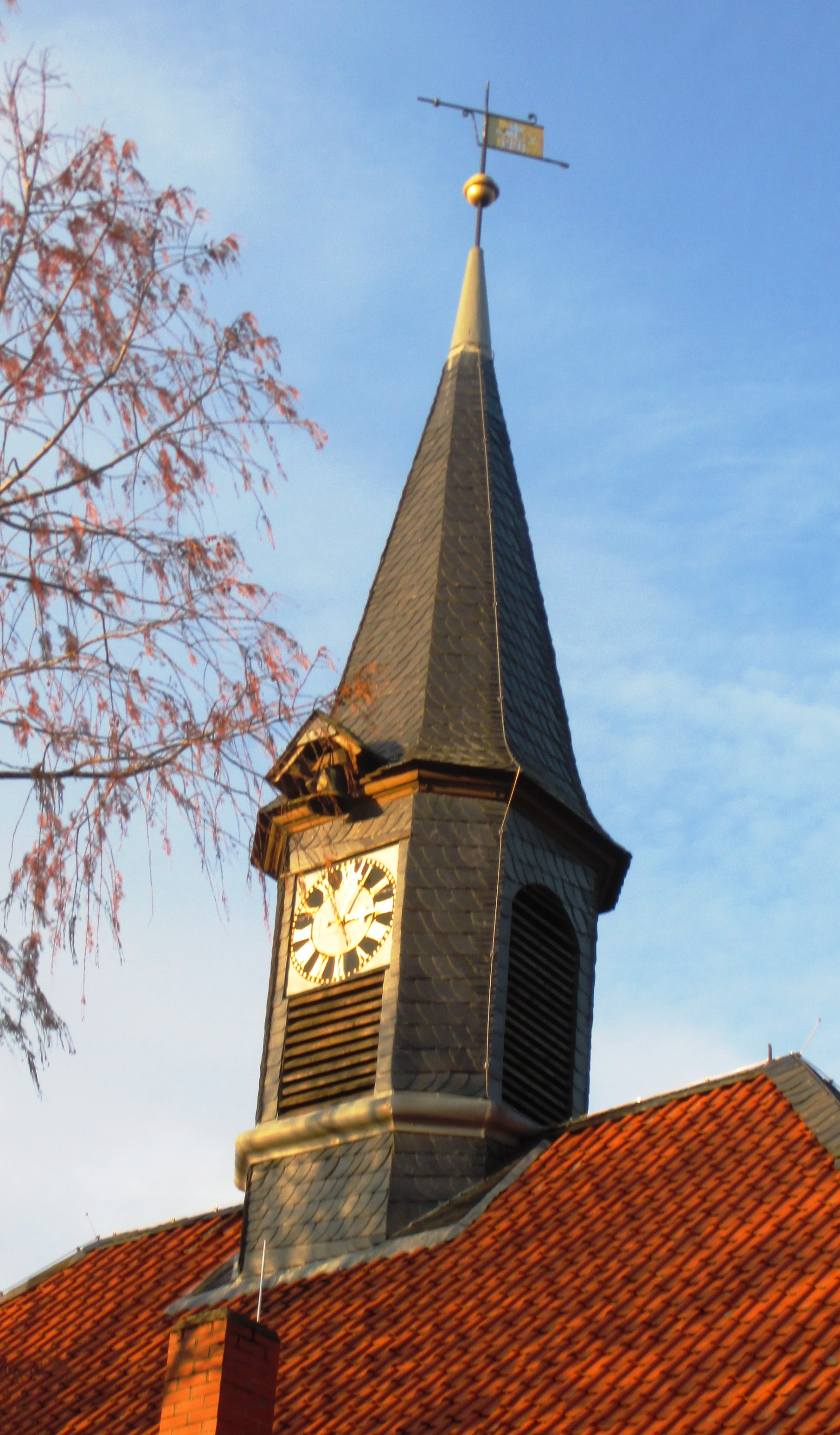 Dachreiter der St.-Romanus-Kirche in Hahausen, Landkreis Goslar